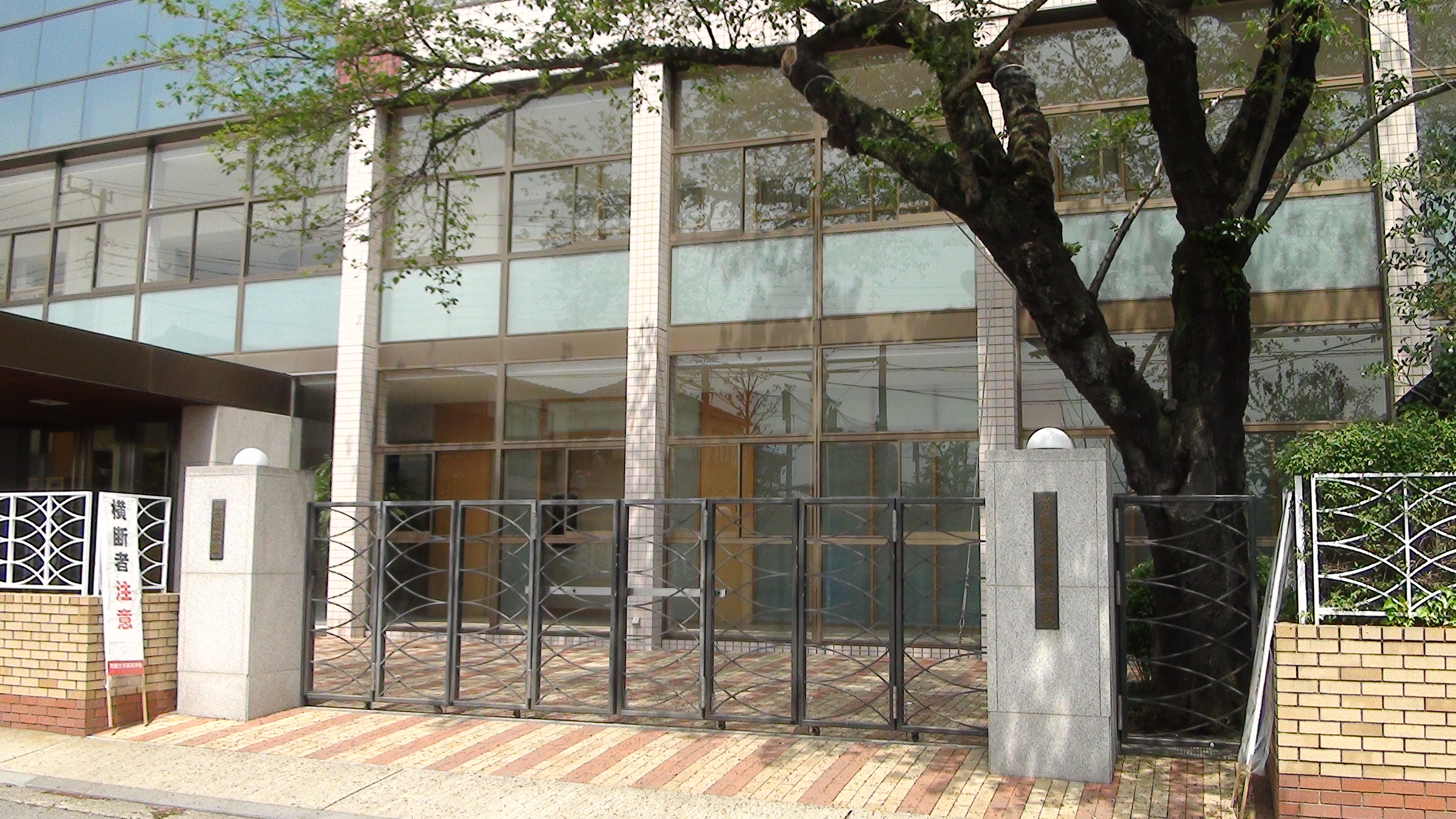 常磐大学高等学校